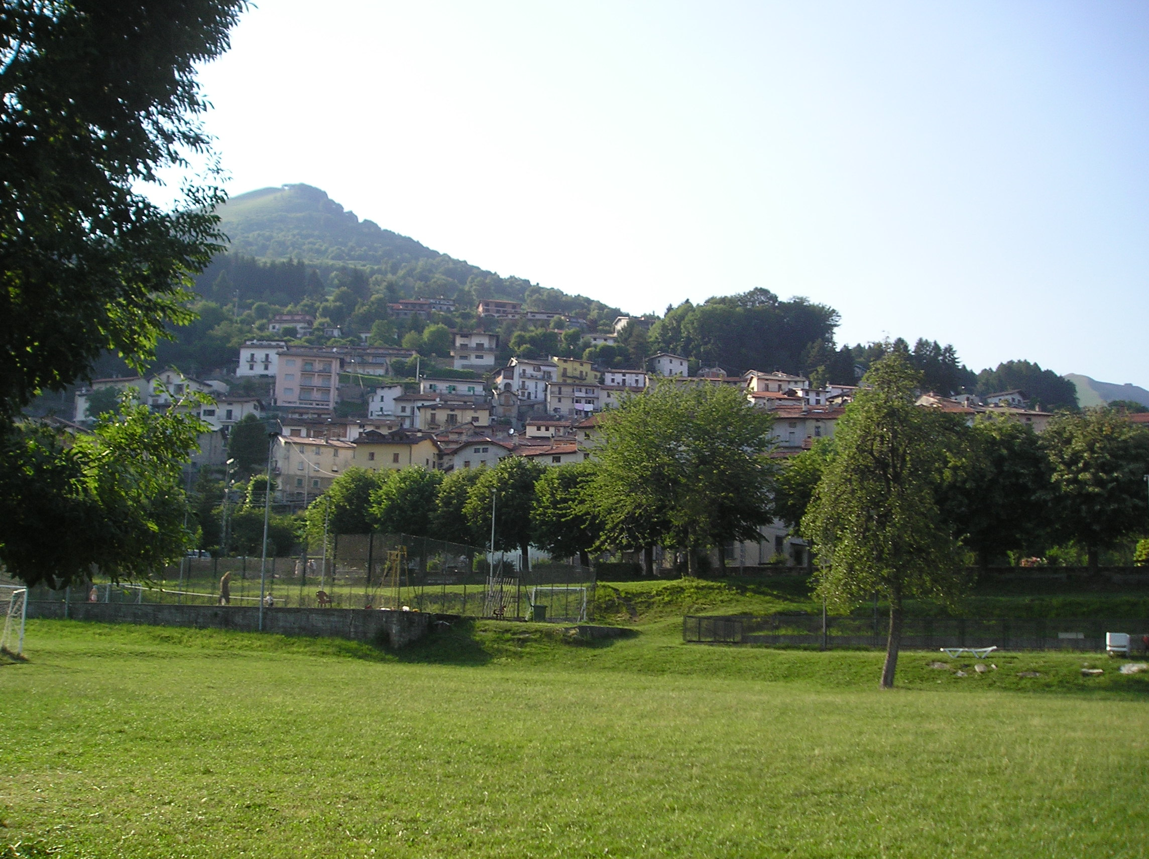 (Questa foto rappresenta l'abitato di Pigra, in direzione del Pasquella che lo domina dall'alto, è stata scattata da G. Salluzzi nel mese di luglio 2005 ed è rilasciata in Pubblico Dominio )